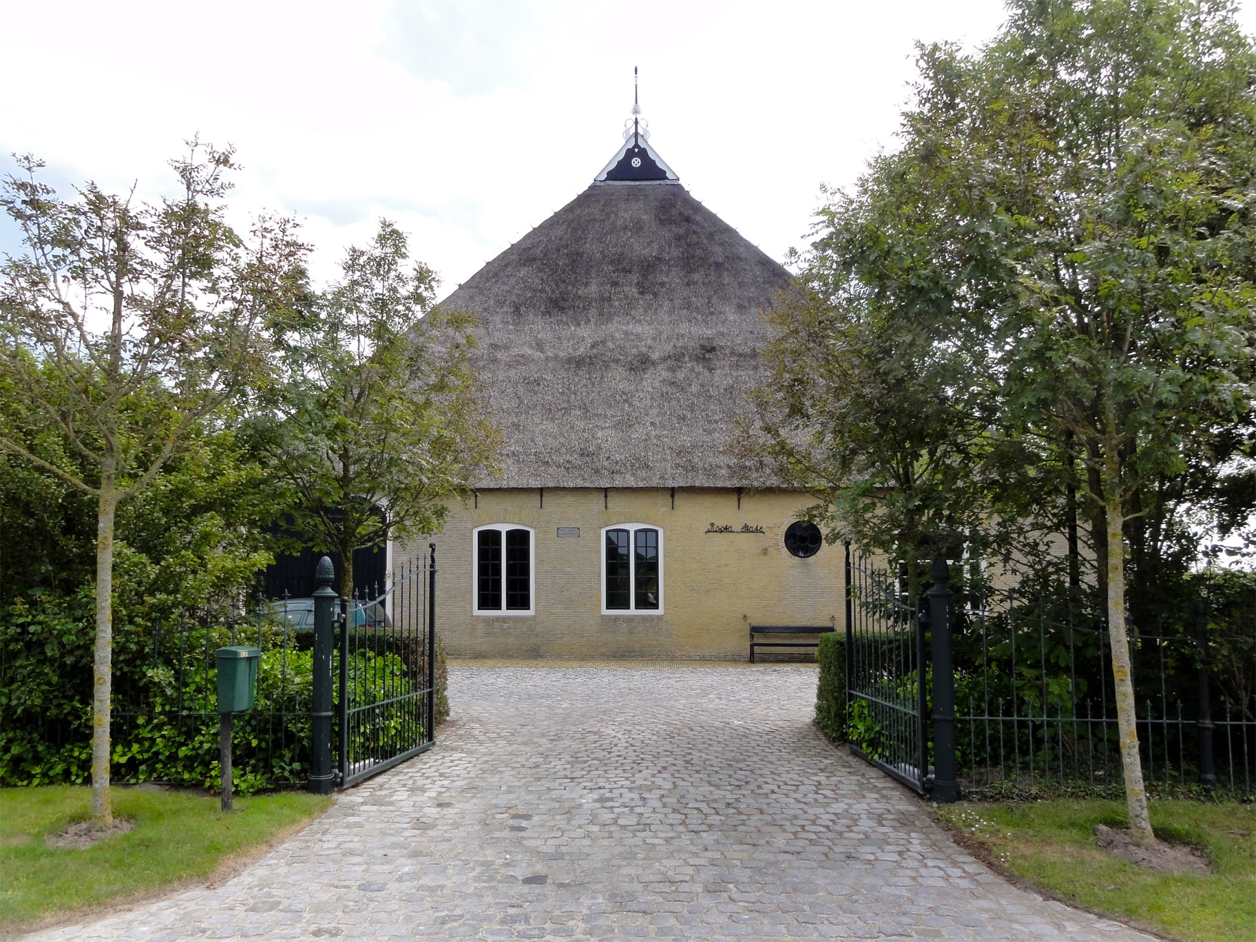 De Roptastate in Wijnaldum